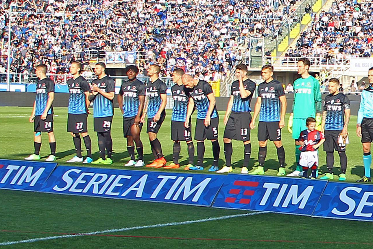 Bergamo, stadio Atleti Azzurri d'Italia, 22 aprile 2017. La formazione dell'Atalanta scesa in campo nella vittoriosa sfida casalinga contro il Bologna (3-2) e valevole per la 33ª giornata del campionato italiano di Serie A 2016-17.